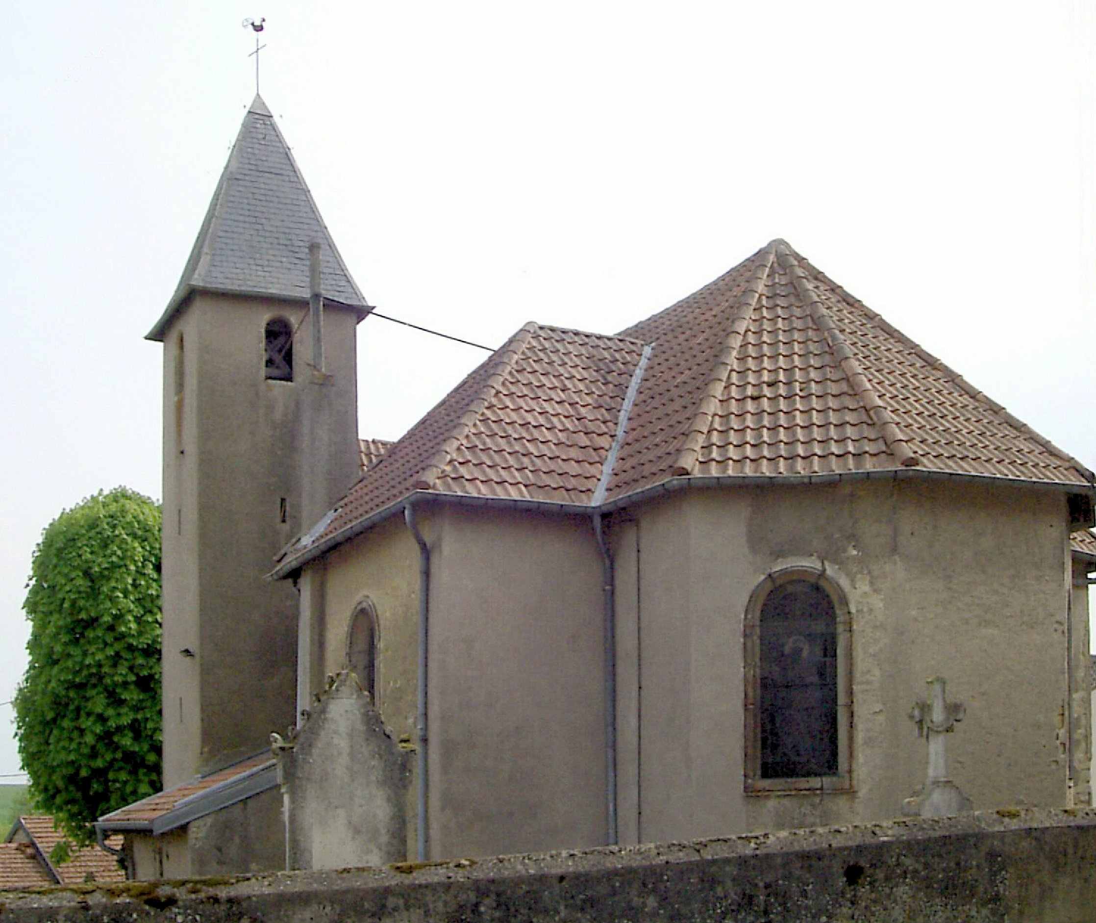 L'église Saint-Pierre à Buchy